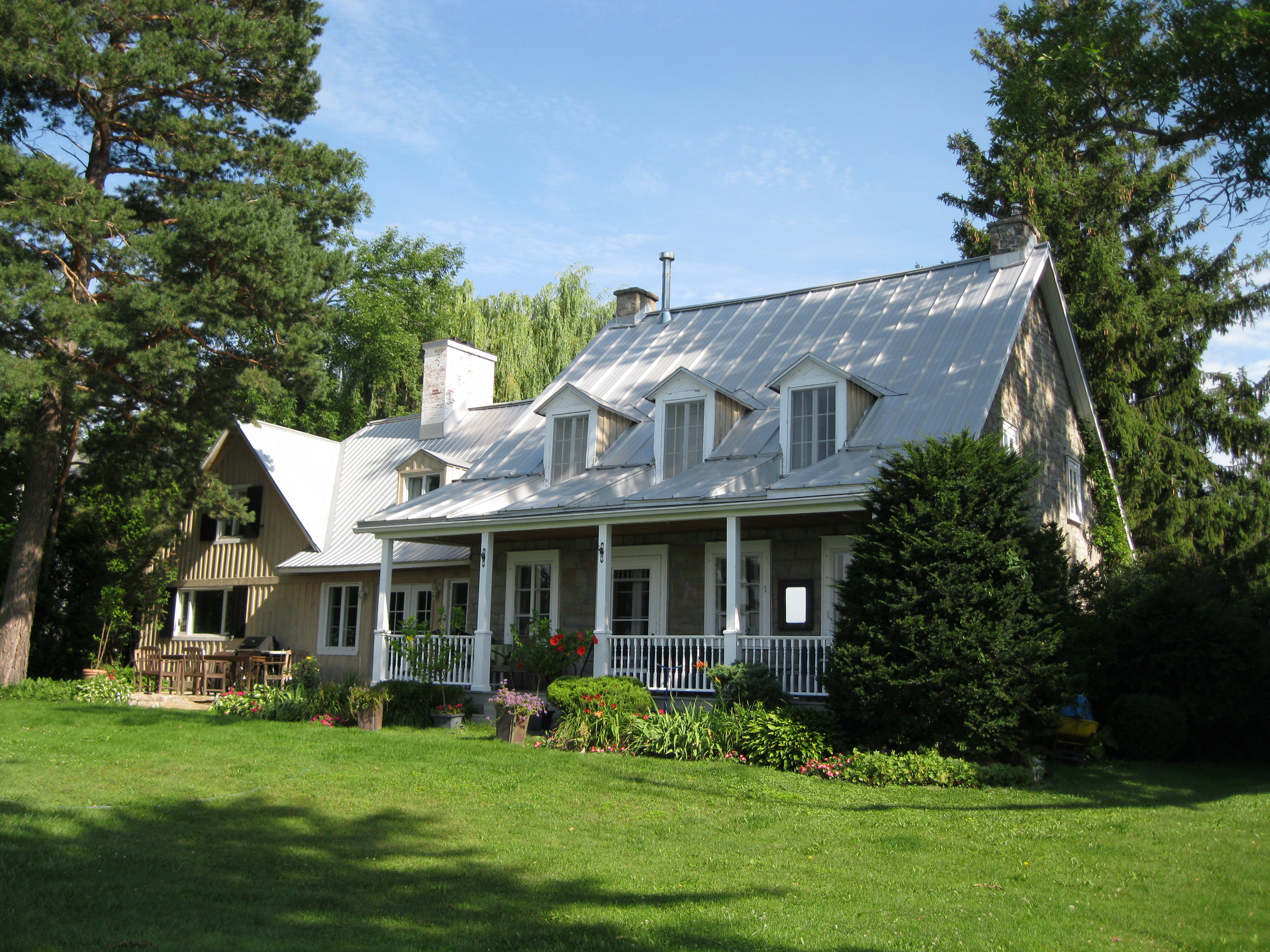 Maison Rangé-dit-Laviolette (ou maison Charles Lenoir), 20122, chemin Lakeshore, Baie-D'Urfé, Québec